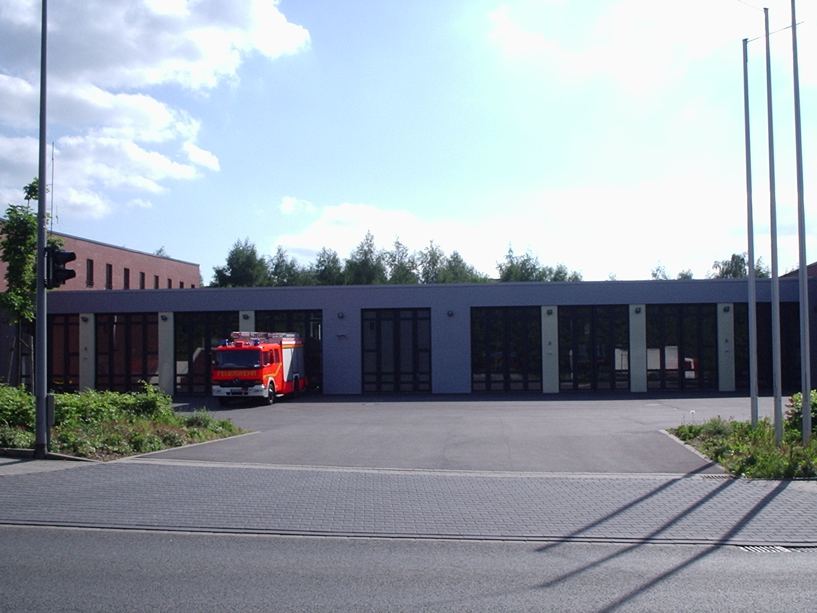 Die Feuer- und Rettungswache 2 der Berufsfeuerwehr Mülheim an der Ruhr